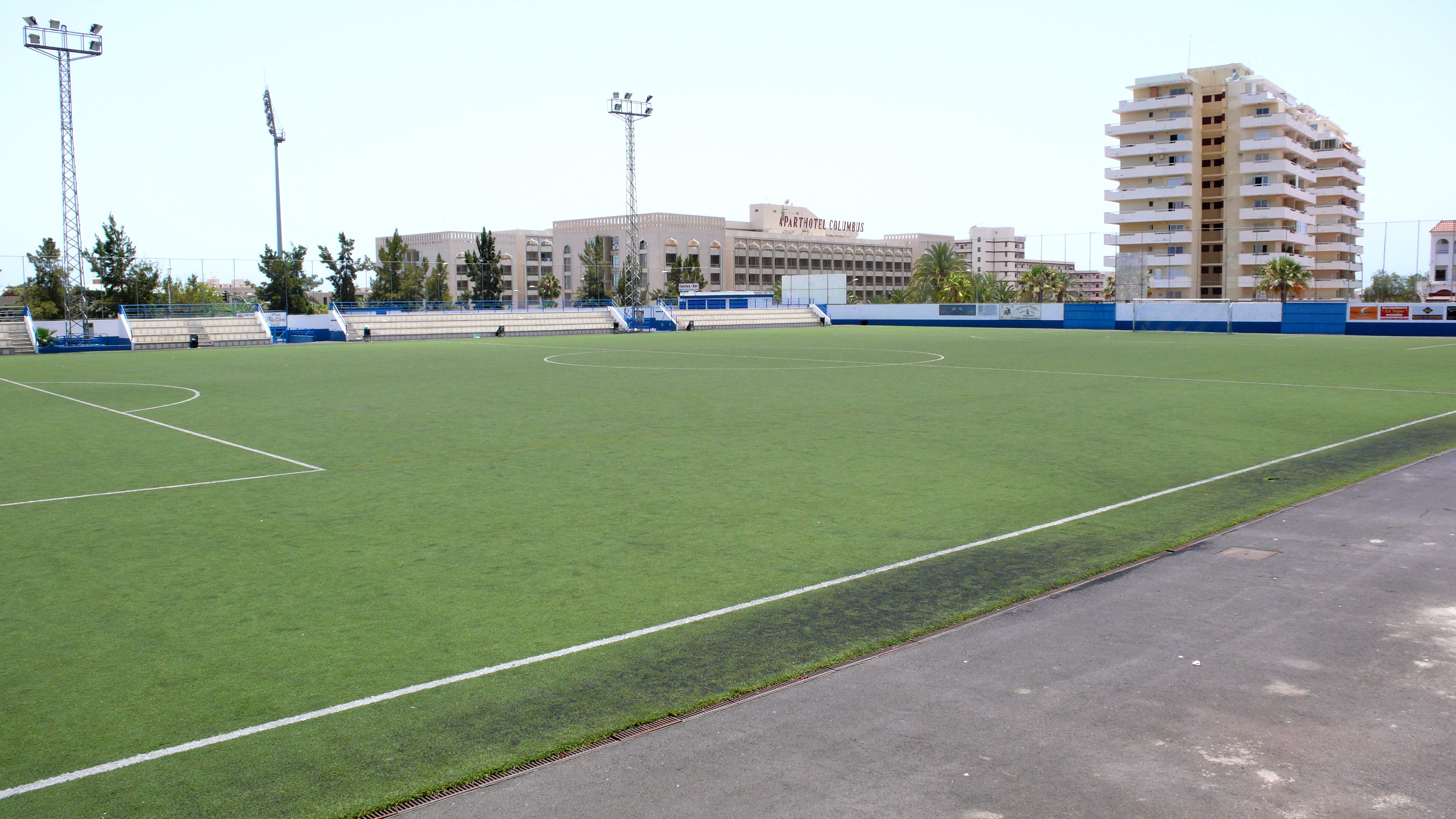 Anexo Estadio Antonio Domínguez en Los Cristianos